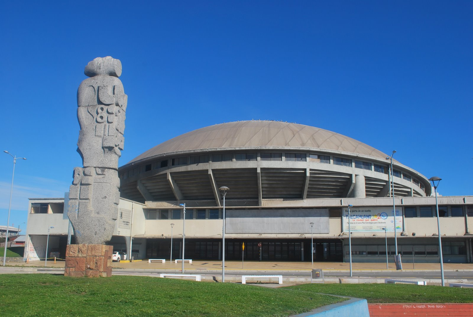 Coliseo La Tortuga